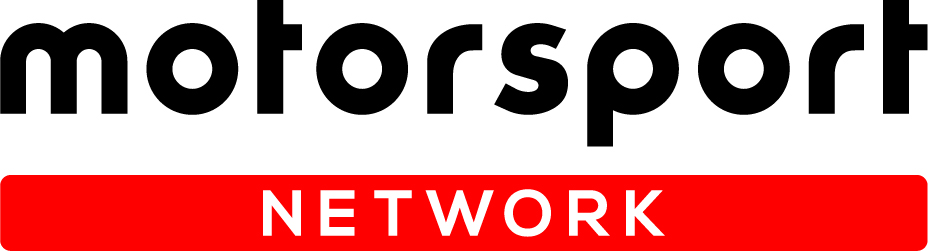 logo di Motorsport Network